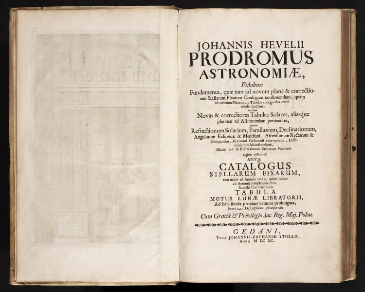 Intestazione del primo volume "Prodromus Astronomiae" dell'opera omonima di Johannes Hevelius, pubblicato nel 1690 a Danzica.